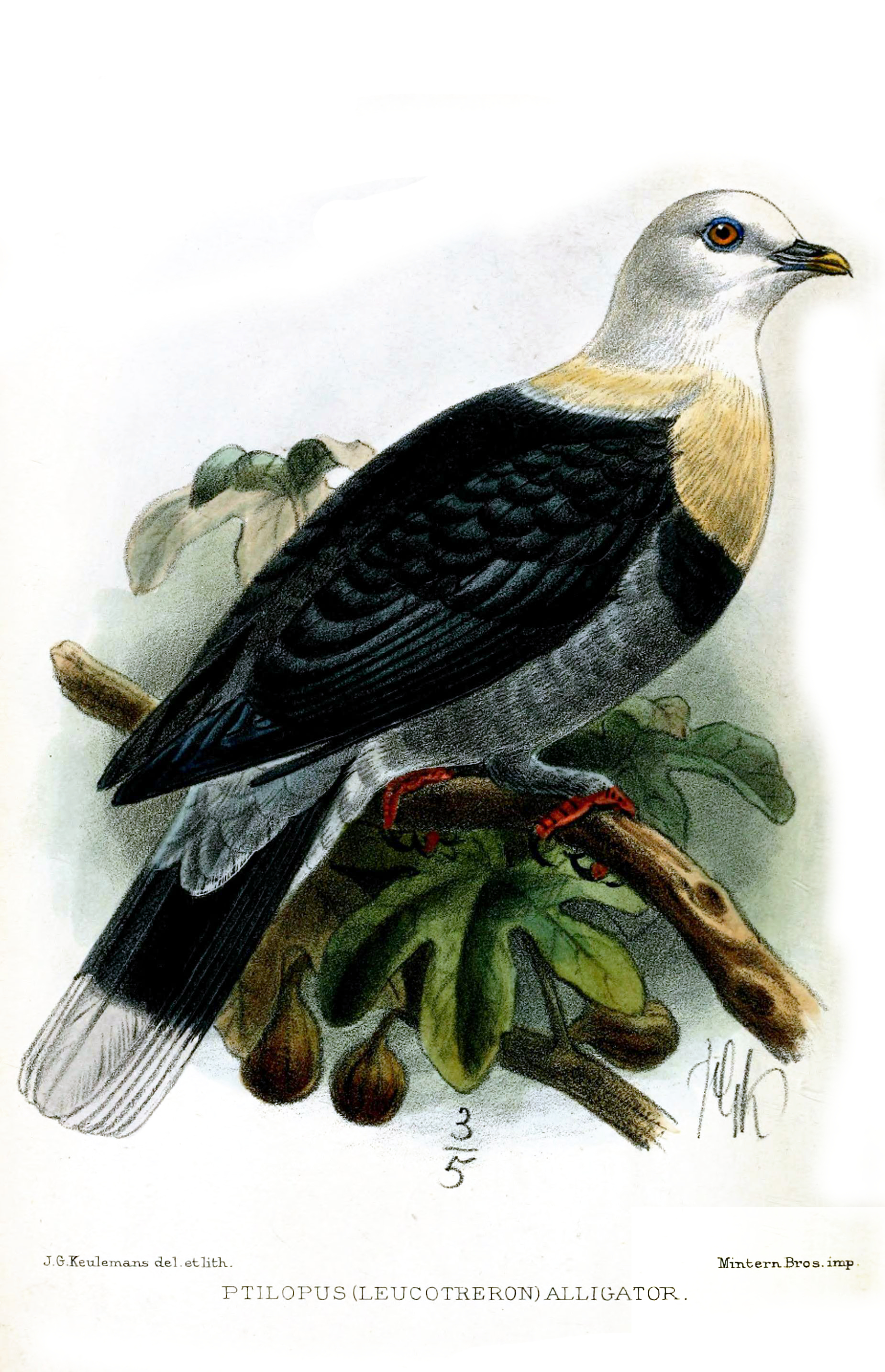 Ptilinopus alligator